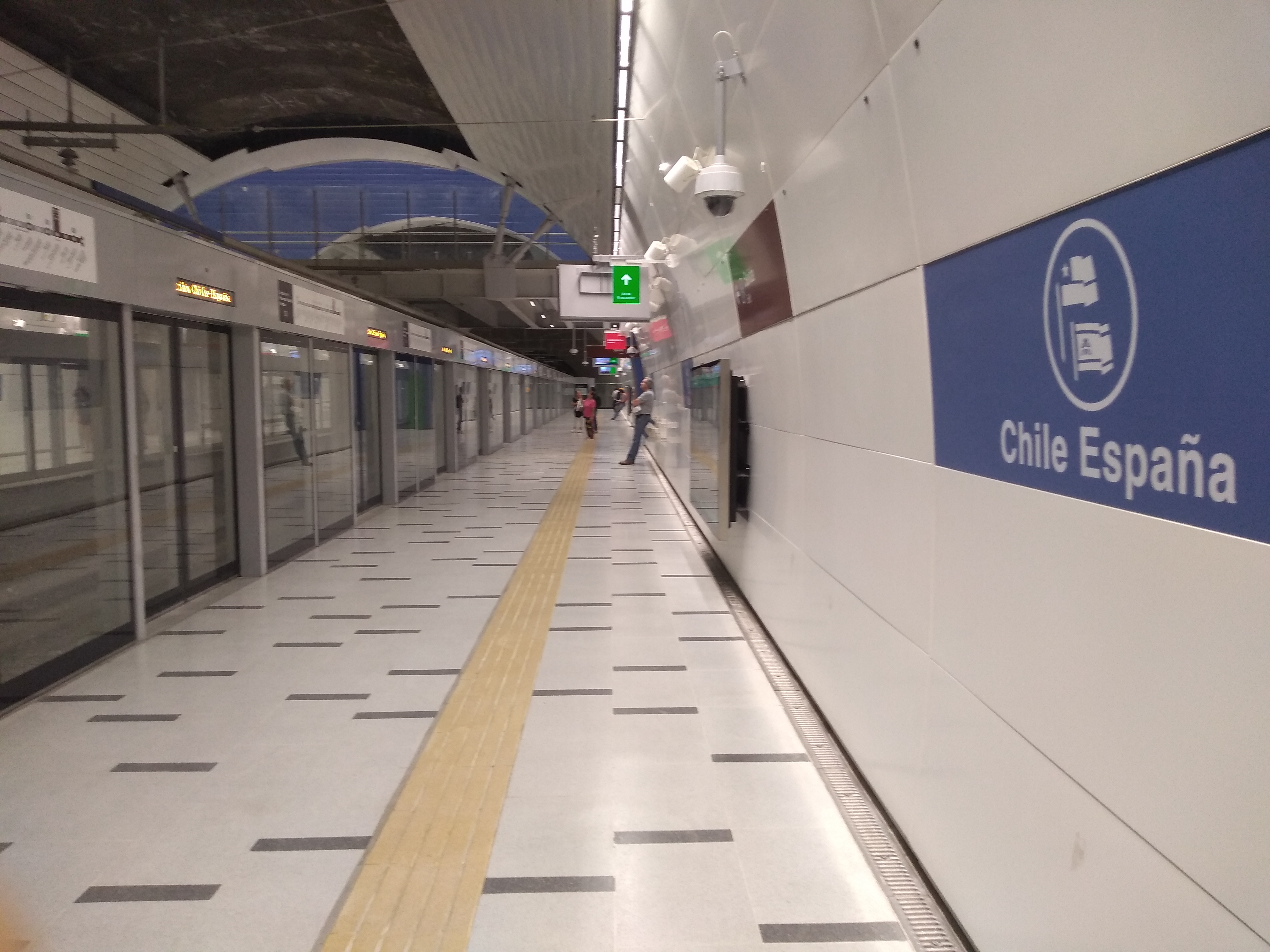 Estación Chile España